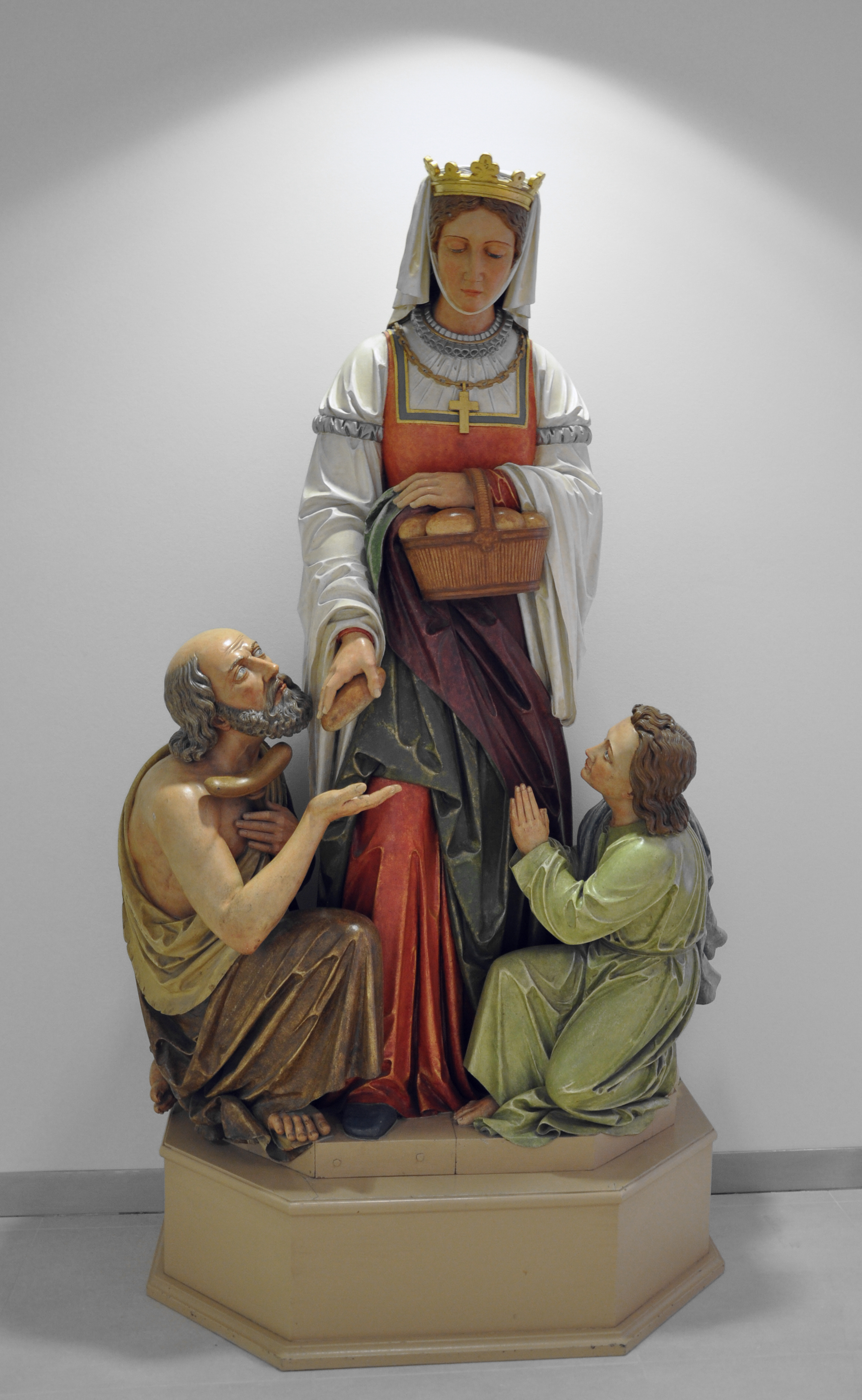 Ravensburg, Krankenhaus St. Elisabeth, Figurengruppe mit hl. Elisabeth (frühes 20. Jahrhundert?)